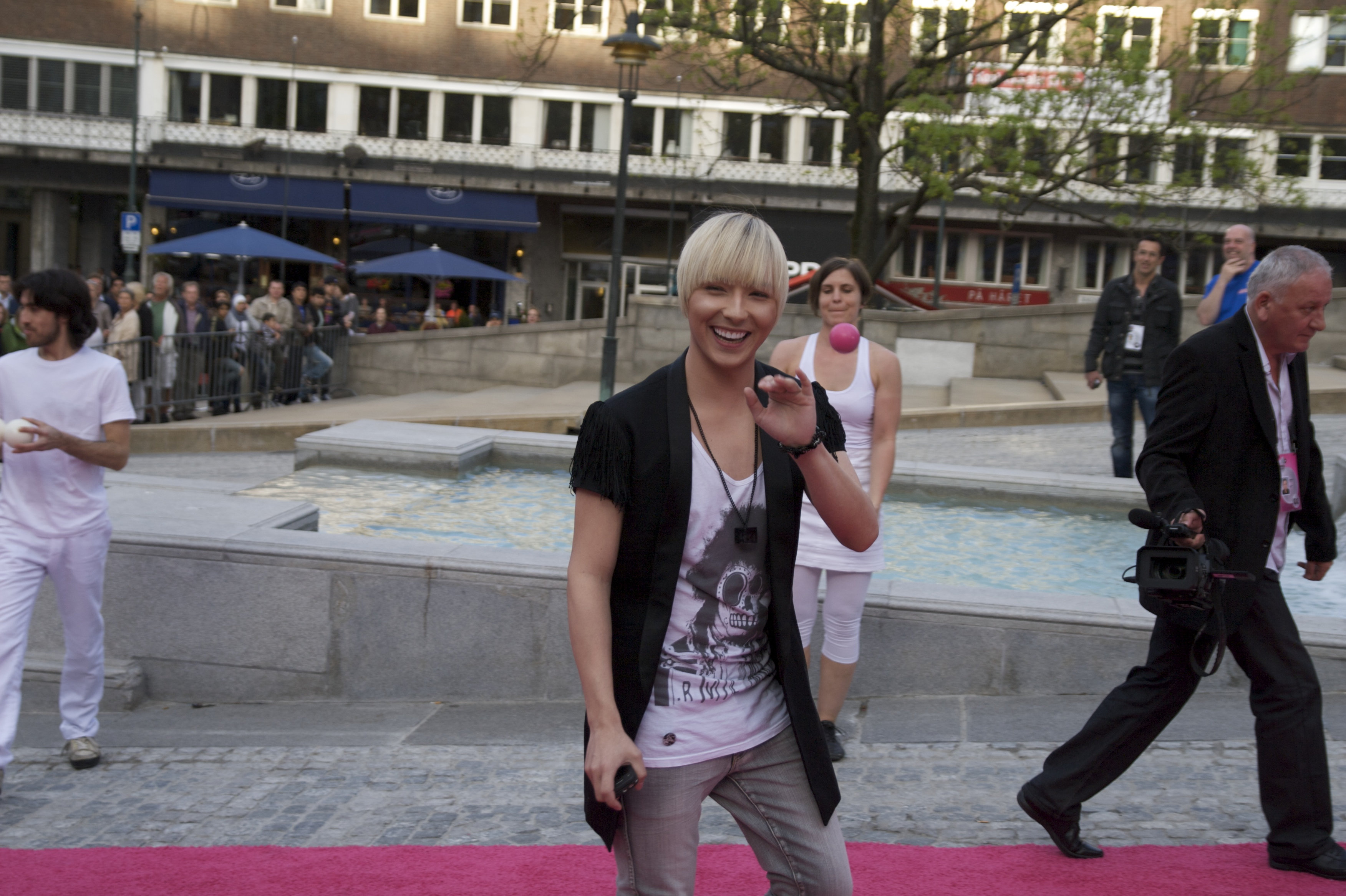 Foto: Vincent Hasselg�rd, Aktiv I Oslo.no